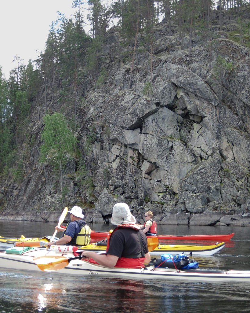 Linnansaari-Kolovesi 1 kayaking